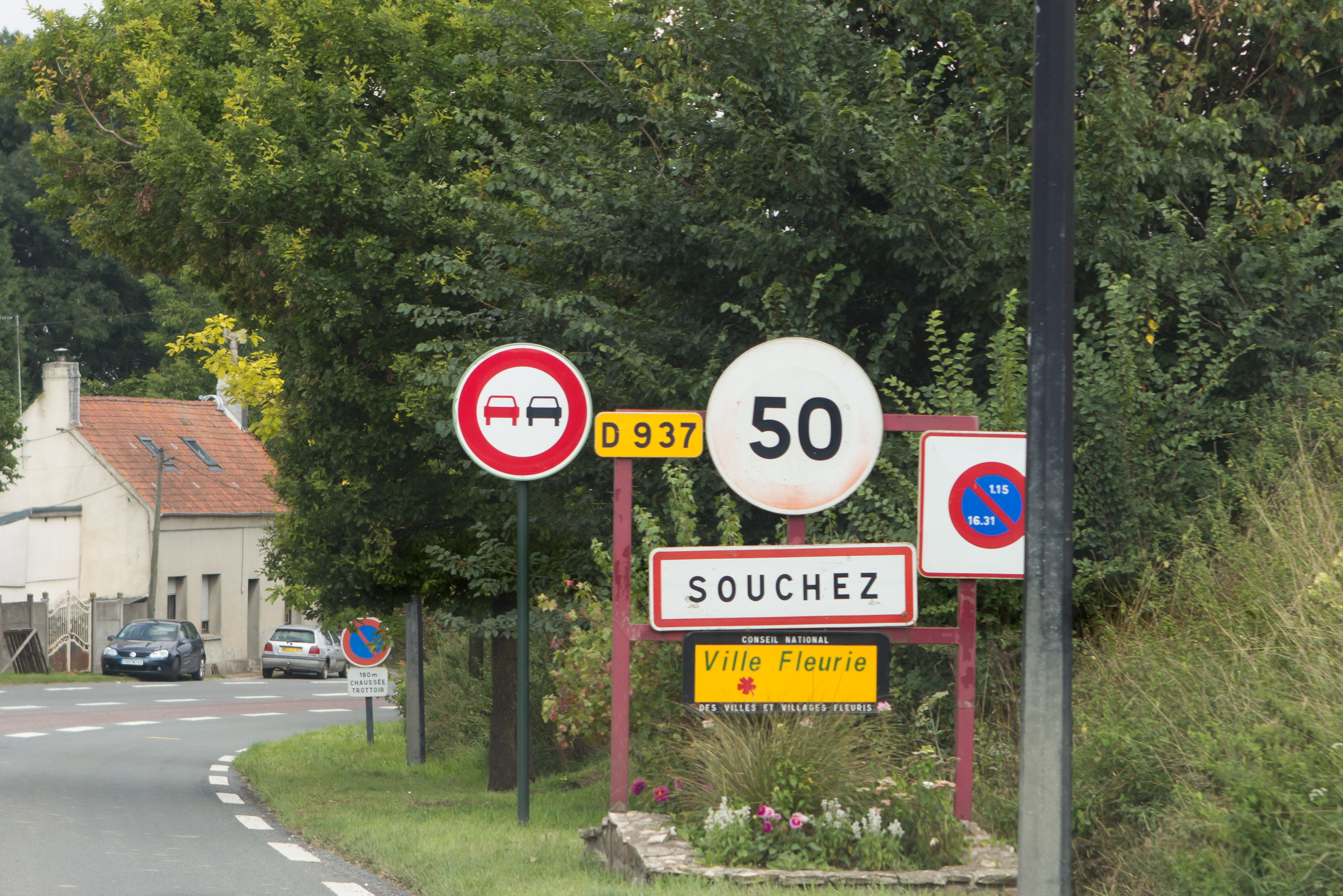 Vue de Souchez / Souchez / Pas-de-Calais / France